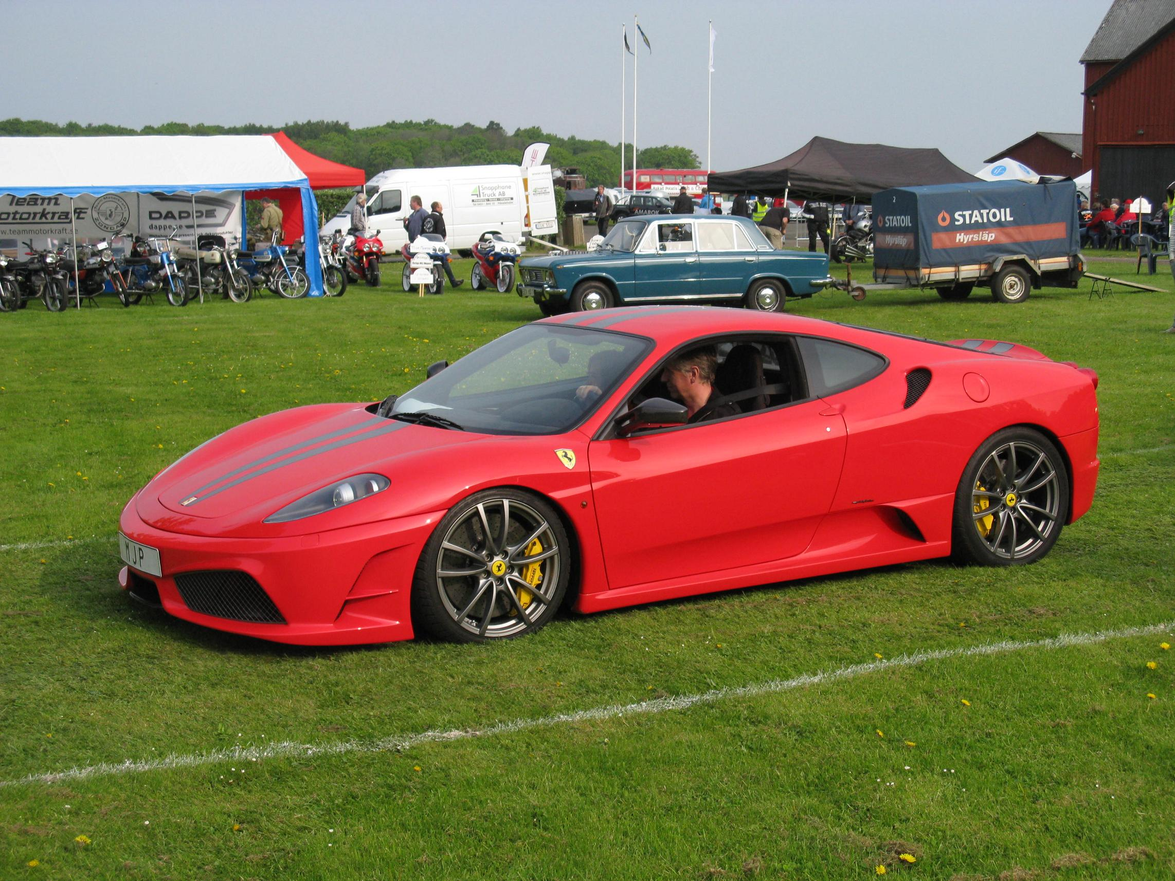 Ferrari F430 Scuderia